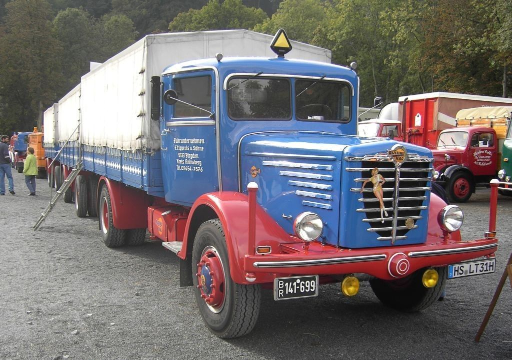 BÜSSING-NAG 5000 S mit HANOMAG- und KHD-Hänger, Baujahr 1948Aufgenommen während der 4. Internationalen Nutzfahrzeug-Veteranen-Schau in Weilburg/Lahn am 30. September und 1. Oktober 2006.